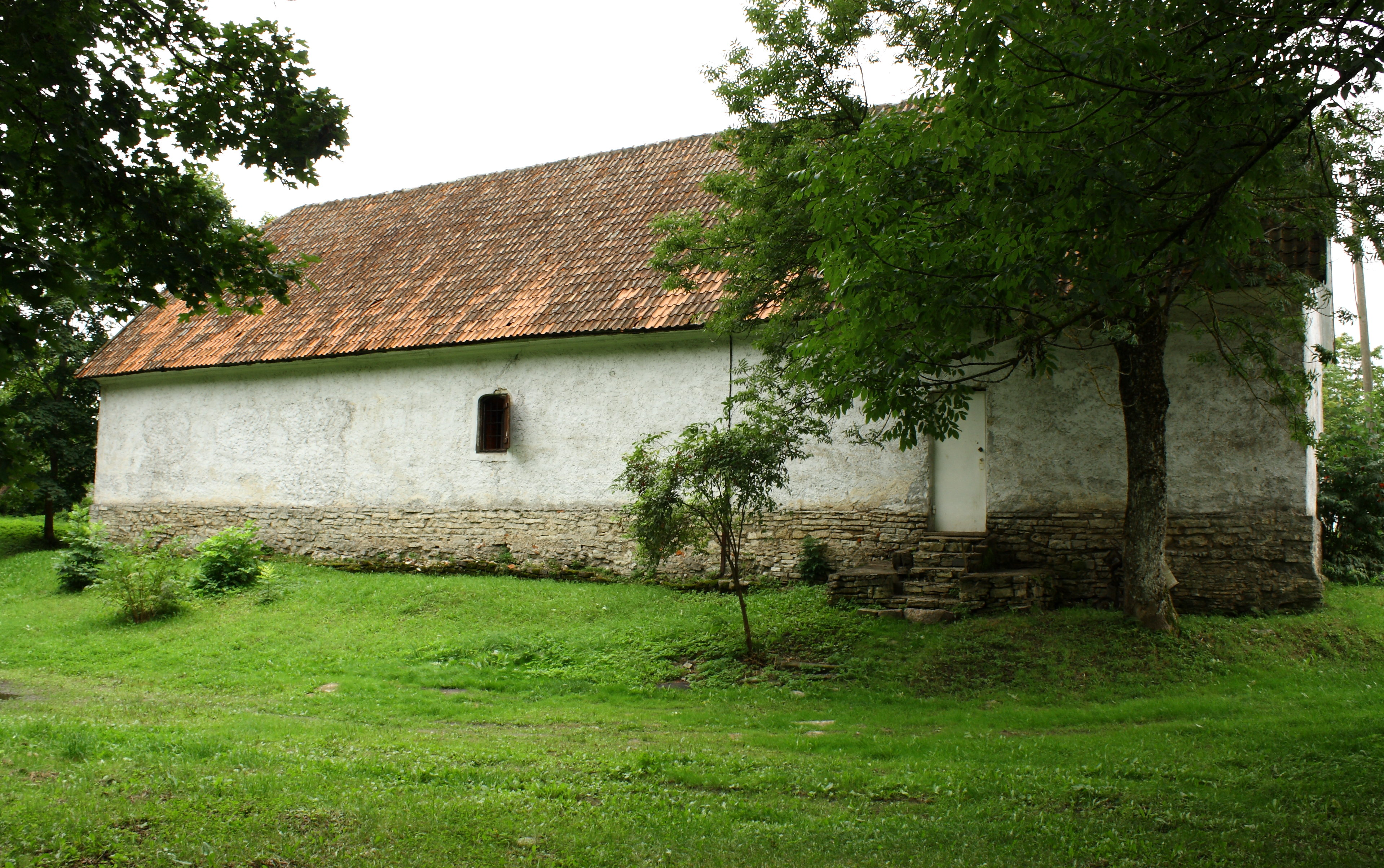 Paide magasiait, ehitismälestis, Tallinna tn 25